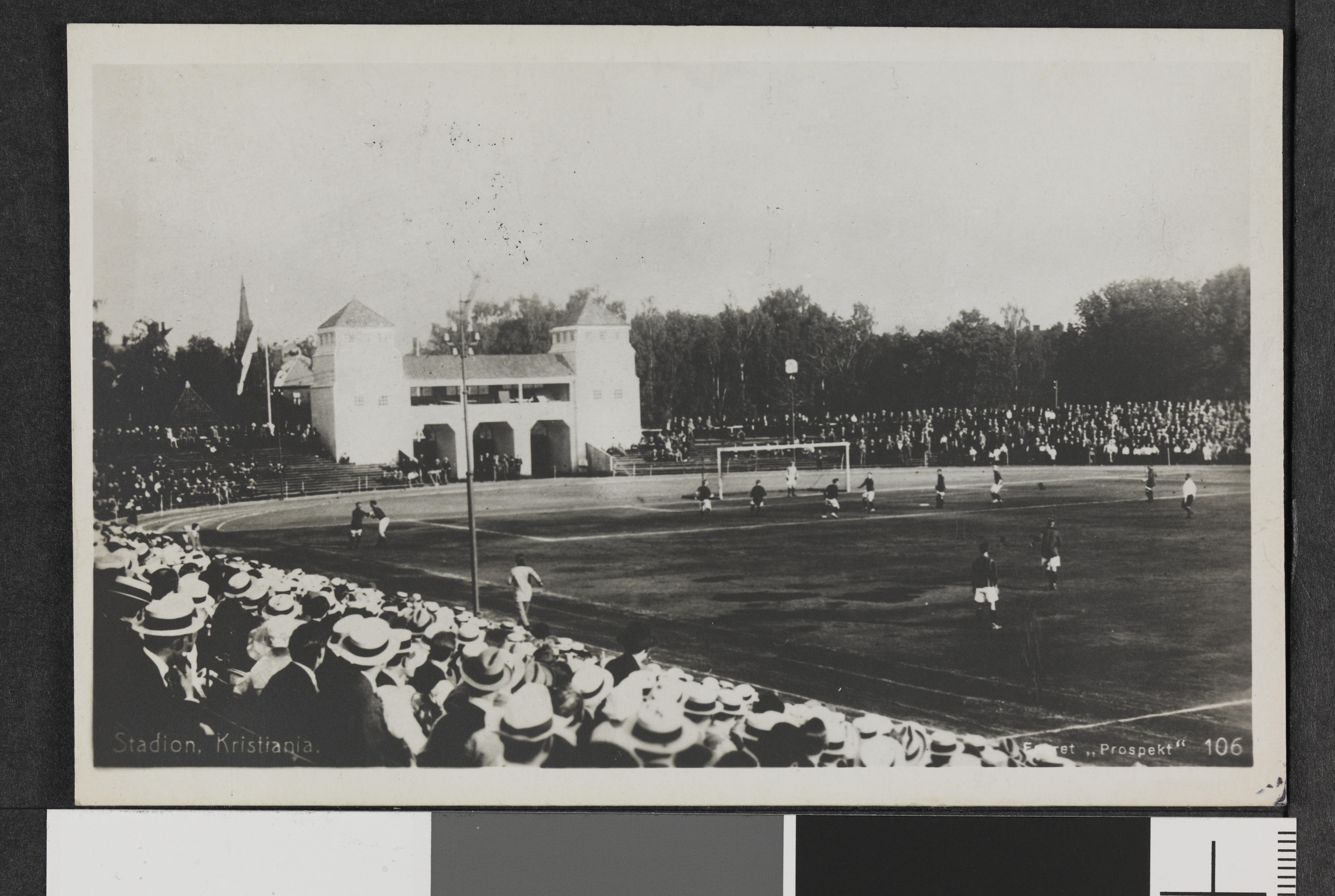 Bildet er hentet fra Nasjonalbibliotekets bildesamling Frogner,Frogner stadion, Oslo, Oslo